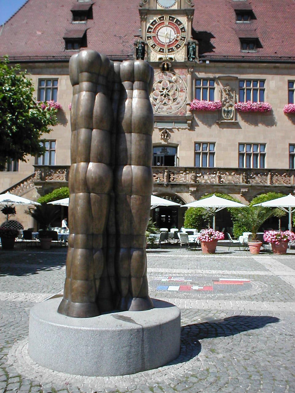 Große Dreiergruppe für Agora, Skuplptur von Joannis Avramidis vor dem Rathaus Heilbronn